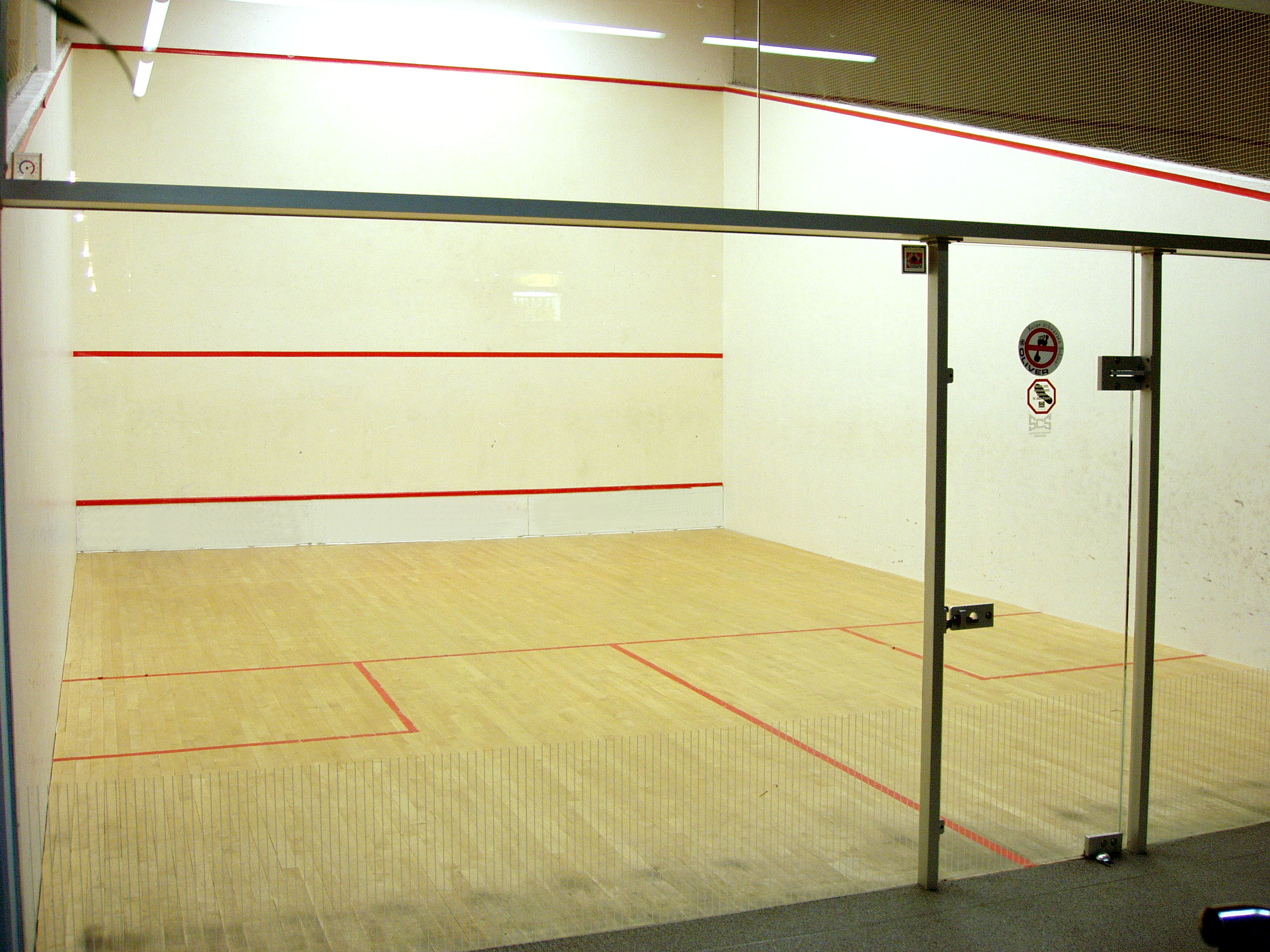 Squashcourt Aufnahme am 9. Sept. 2005